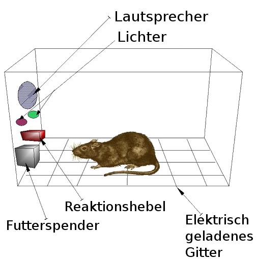 Skinner box, ein Käfig um Verhaltensexperimente mit Tieren durchzuführen